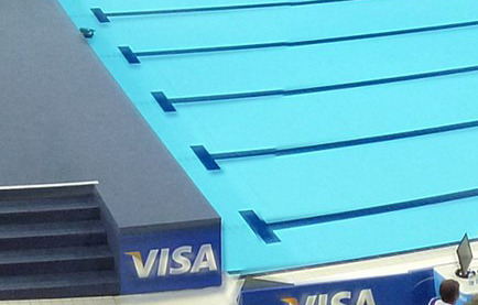 Parallax error in a photo stitching of London Aquatics Centre interior